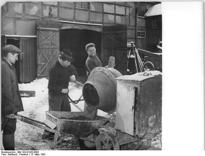 Clausnitz, LPG, Bau eines Stalls Zentralbild Gahlbeck 15.3.1962 Kongreßschwung spornt Initiative an - Drei LPG Typ I in Clausnitz bauen gemeisames Junhviehkombinat Der Schwung des VII. Deutschen Bauernkongresses hat auch die Initiative der Genossenschaftsbauern von Claußnitz im Landkreis Karl-Marks-Stadt angespornt, ihren Weg zum weiteren Wohlstand durch ökonomische Stärkung der LPG zielbewust weiterzugehen.Drei LPG Typ I des Ortes haben bereits mit dem Bau eines Jungviehkombinates für 40 Tiere begonnen , um zu einem Tbc-freien Milchviehbestand im Dorf zu kommen und die höhere Milchproduktion zu sichern.UBz. Jeder Wintertag wird von den Genossenschaftsbauern und Bauarbeitern voll genutzt, um den gemeinsamen Jungviehstall für 40 Tiere bis zum Frühsommer fertigzustellen . DIE Stellenanlage entsteht im Bebäude des LPG- Mitgliedes Kurt Meißner (links) , der die Beteuung der Tiere übernehmen wird.